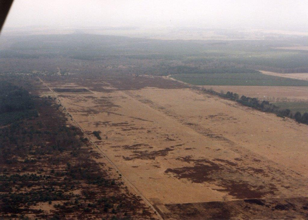 Seit 1991 aufgegebener Bombenabwurf- und Feldflugplatz der Gruppe der Sowjetischen Streitkräfte in Deutschland in der Retzower Heide, Blickrichtung West. Die Bodenziele befanden sich links (südlich) neben der Landebahn